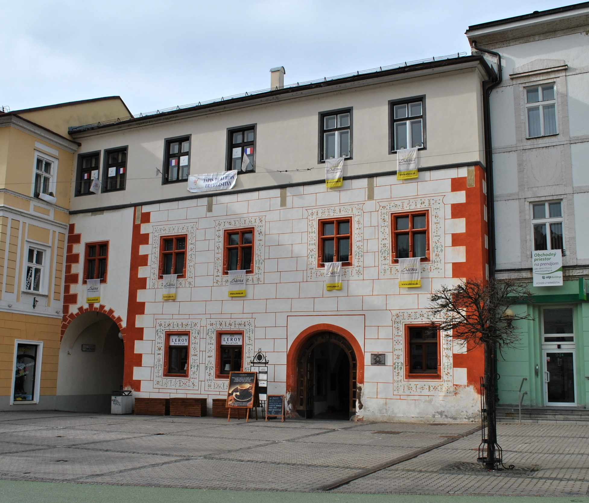 Dom meštiansky